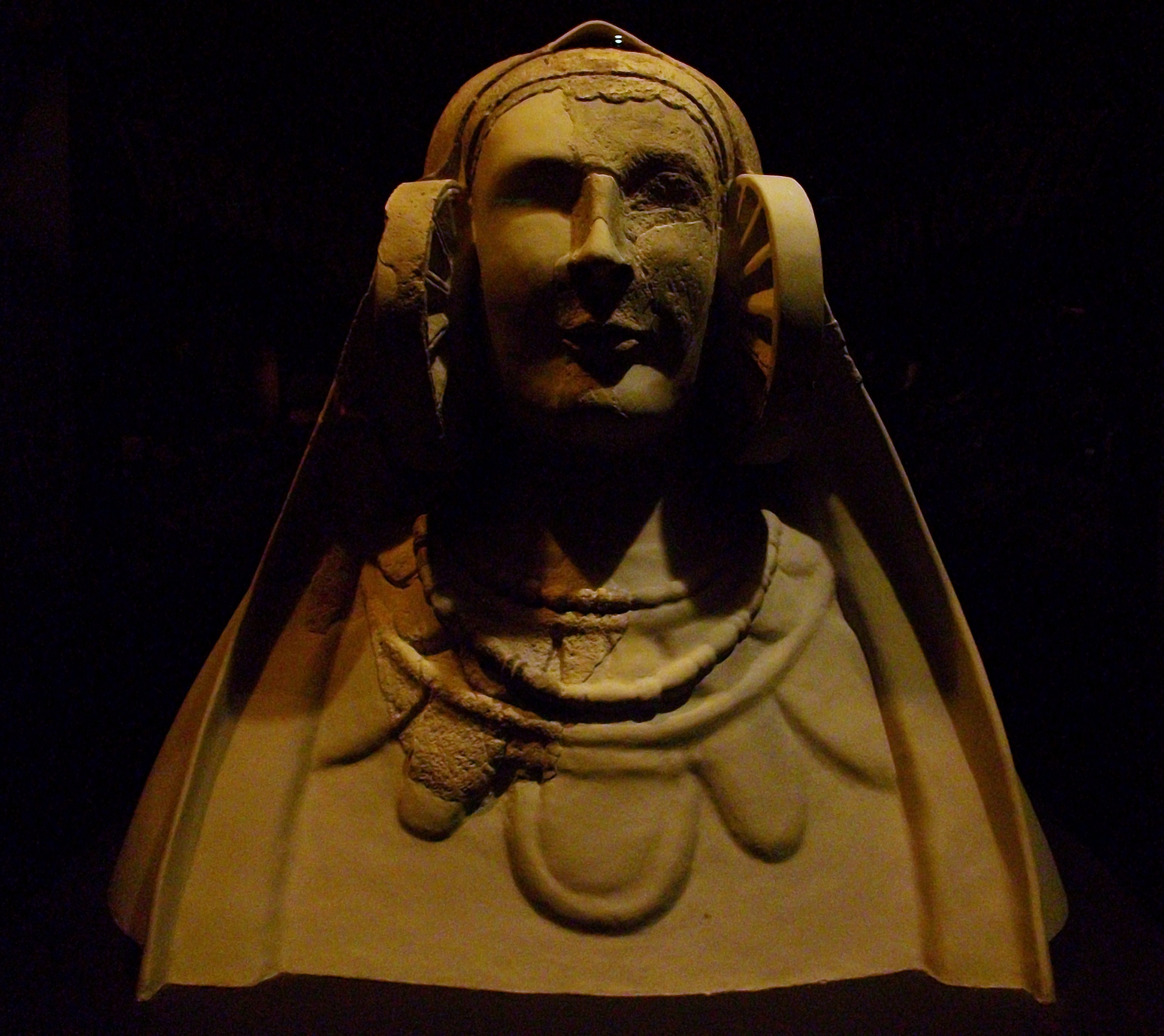 La Dama de Guardamar.